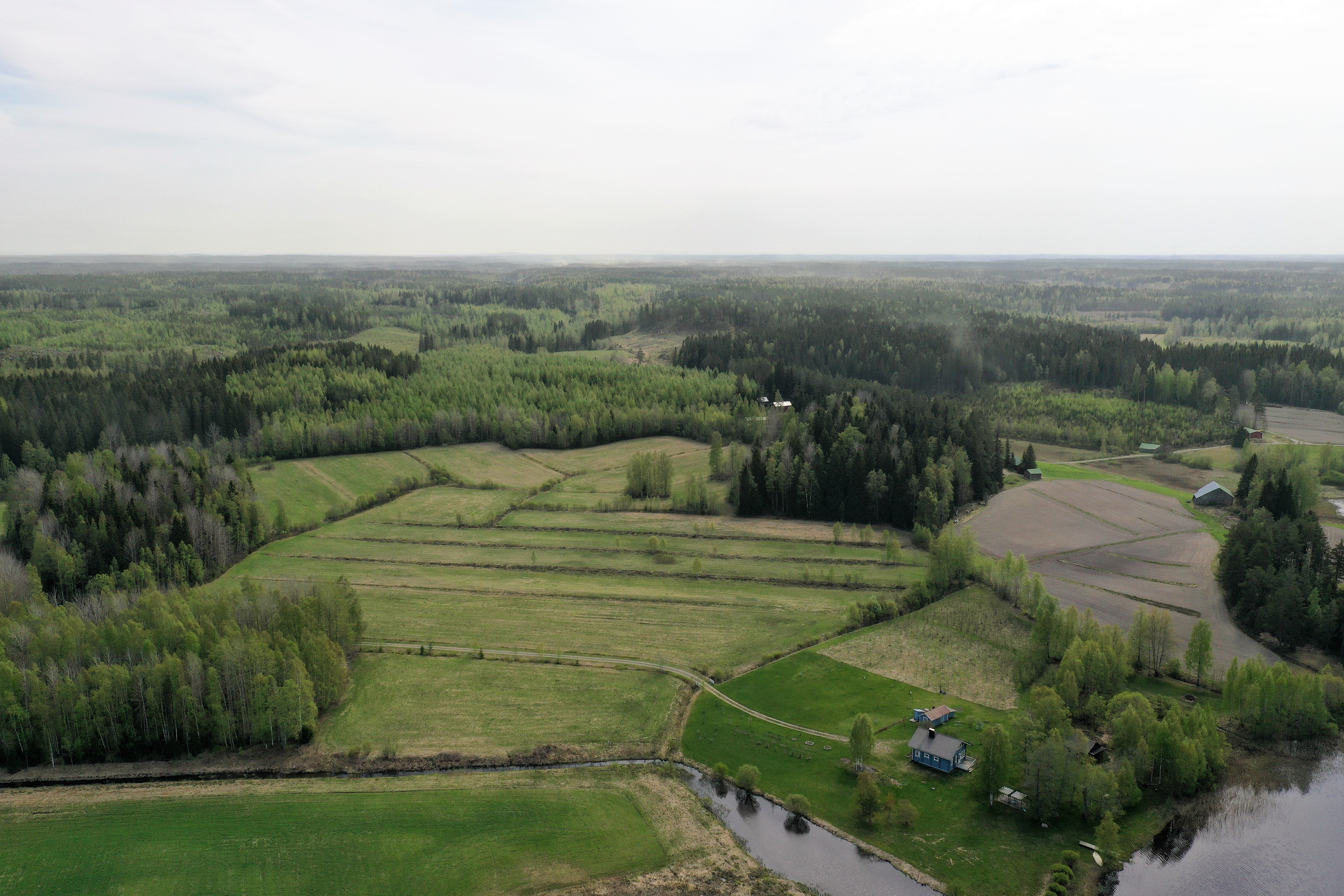 Märkäjärvenmaan maisemaa Sastamalan Suodenniemellä